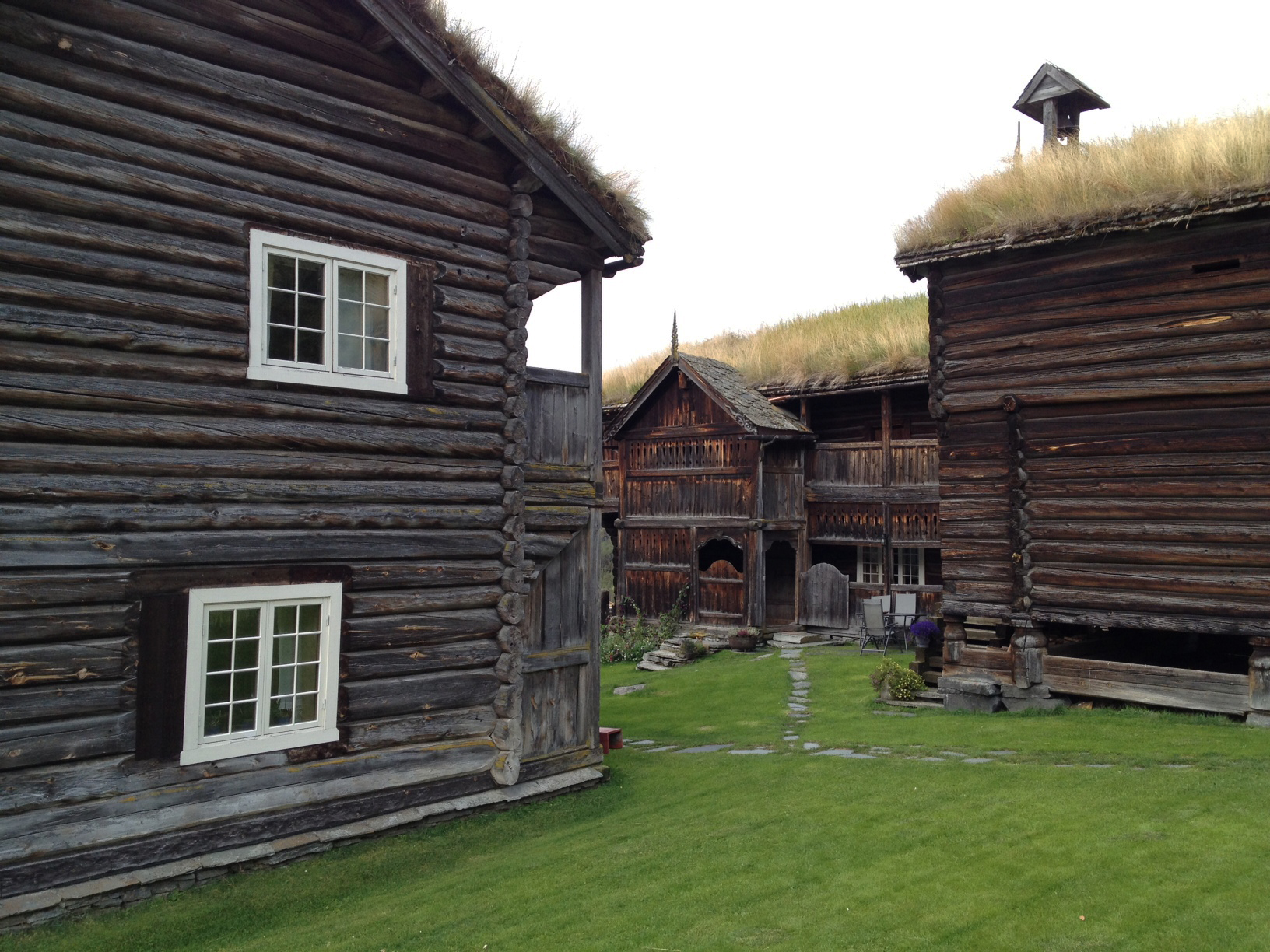 Glimt inn på tunet på gården Søre Harildstad i Heidal, Sel. Til høyre: Stabburet; i midten: Nørdre stu; til venstre: Søre stu. Gården er totalfredet